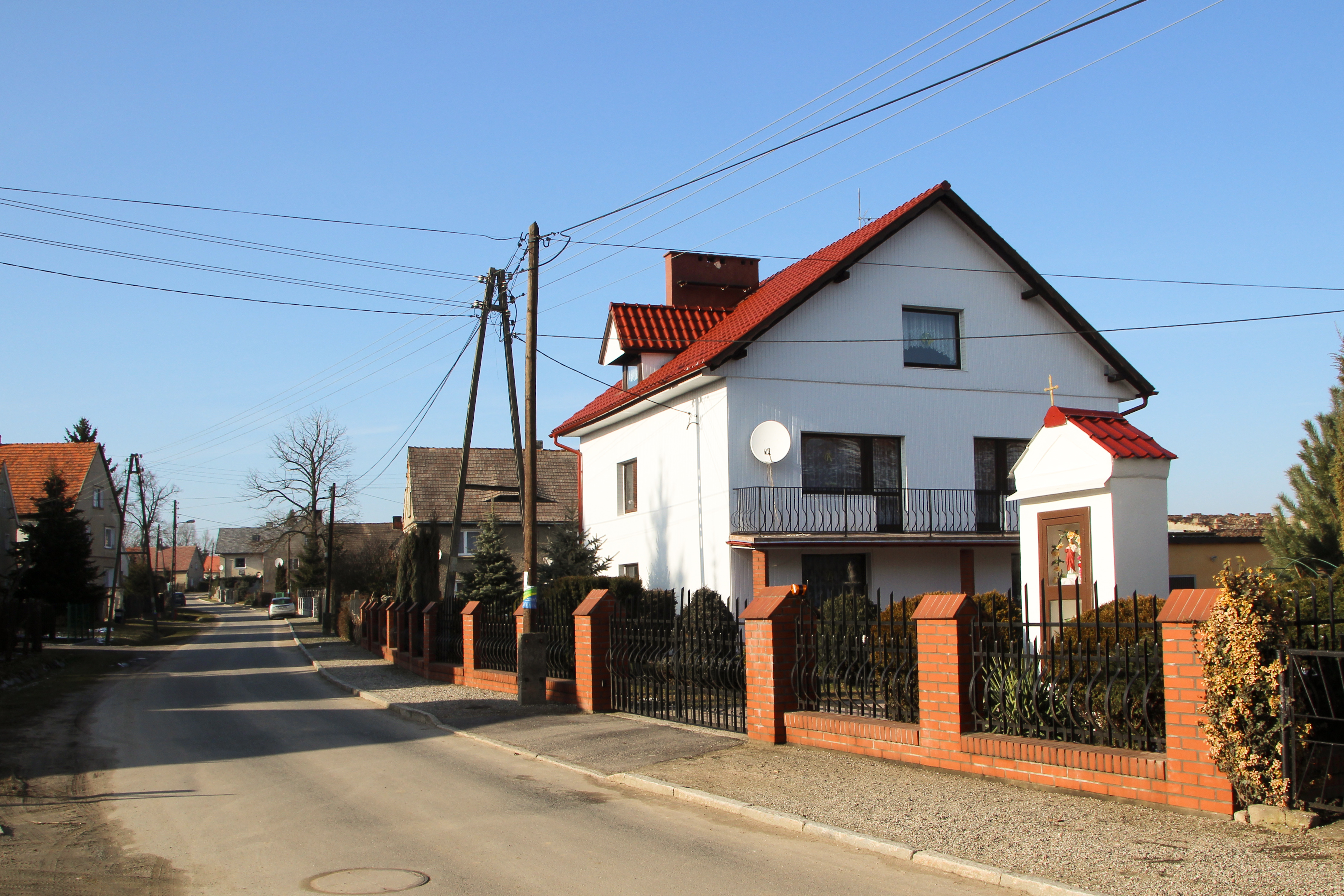 Morów – wieś w Polsce, w województwie opolskim, w powiecie nyskim, w gminie Nysa.